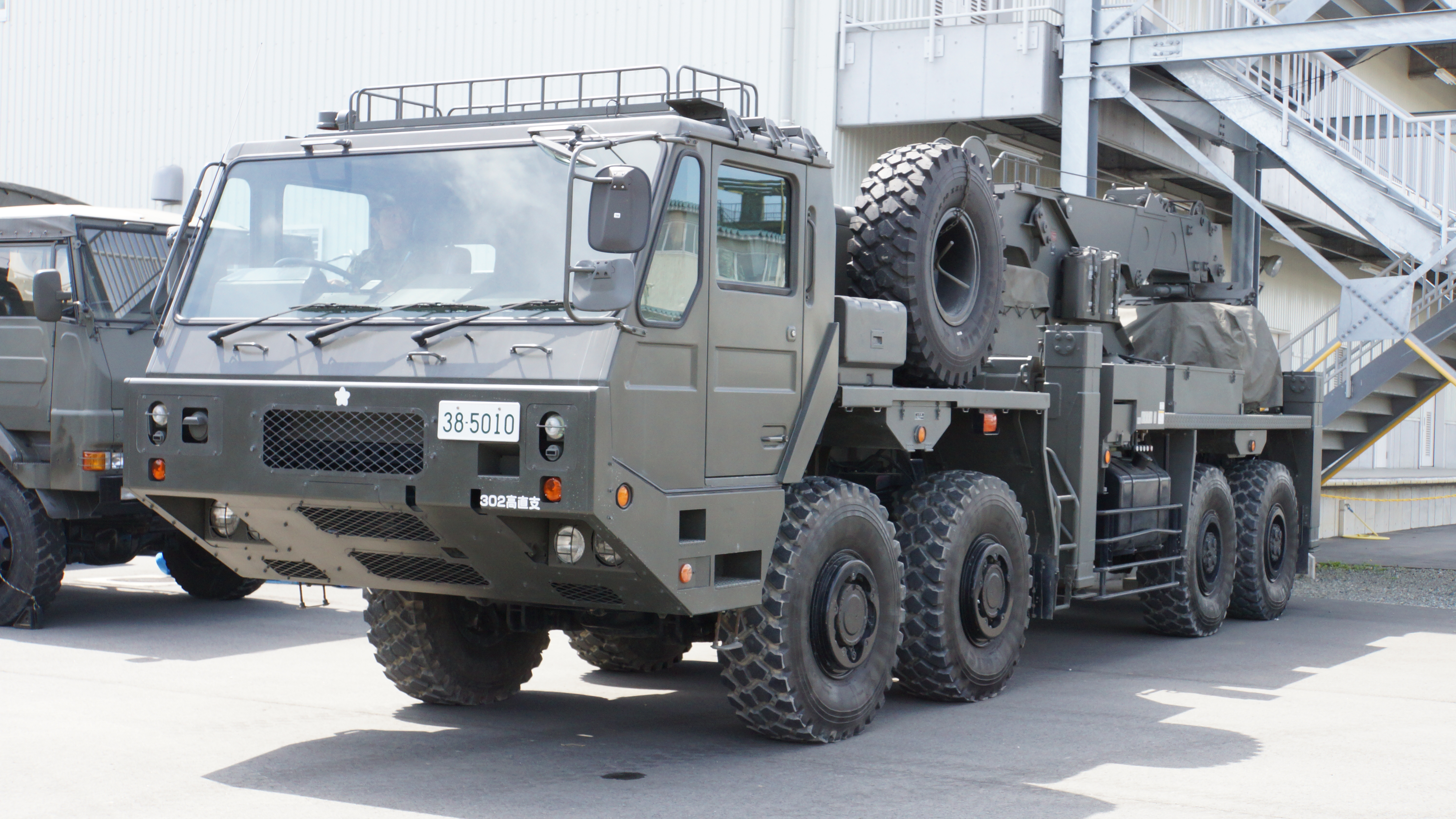 陸上自衛隊 重装輪回収車（38-5010号車）。2015年9月13日 伊丹駐屯地にて。